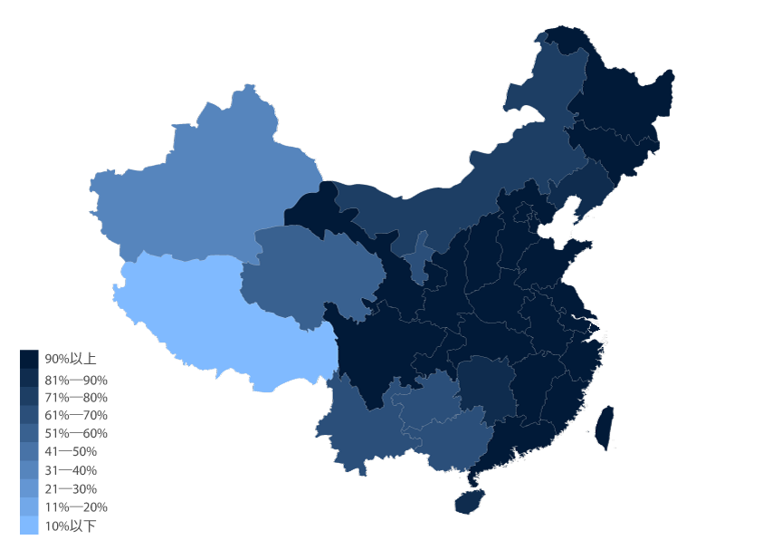 2000年的汉族比例